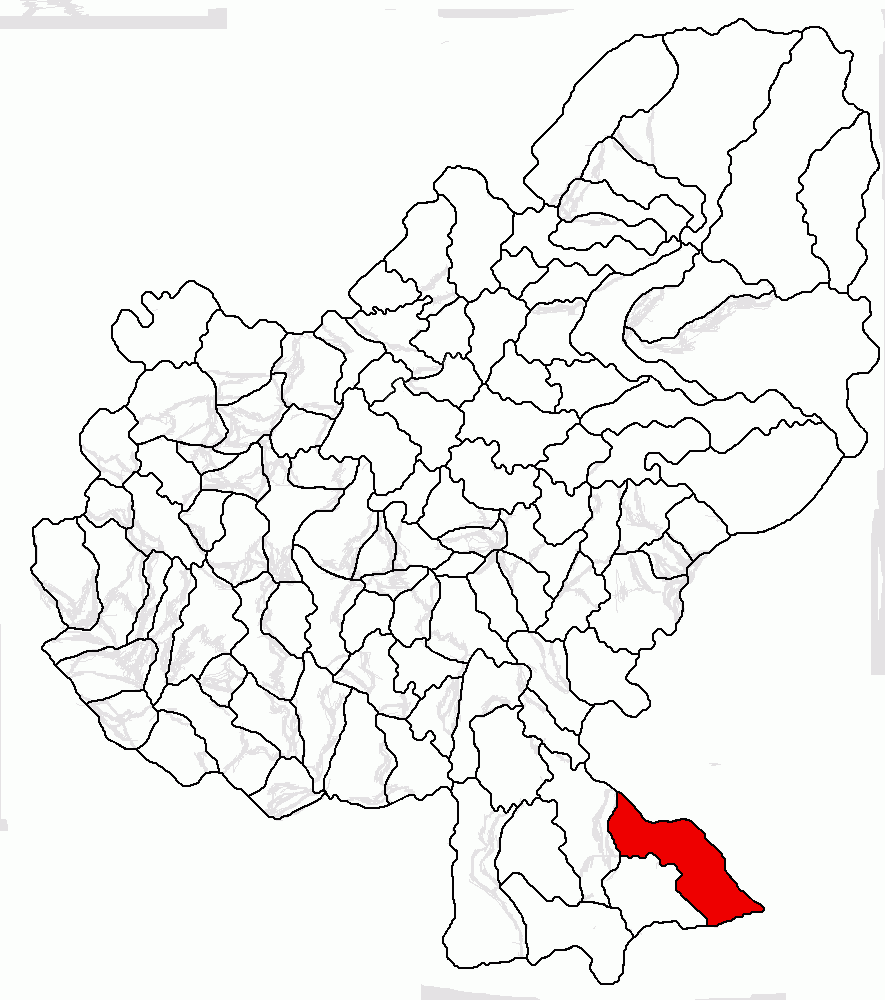 Categorie:Hărţi ale judeţului Mureş